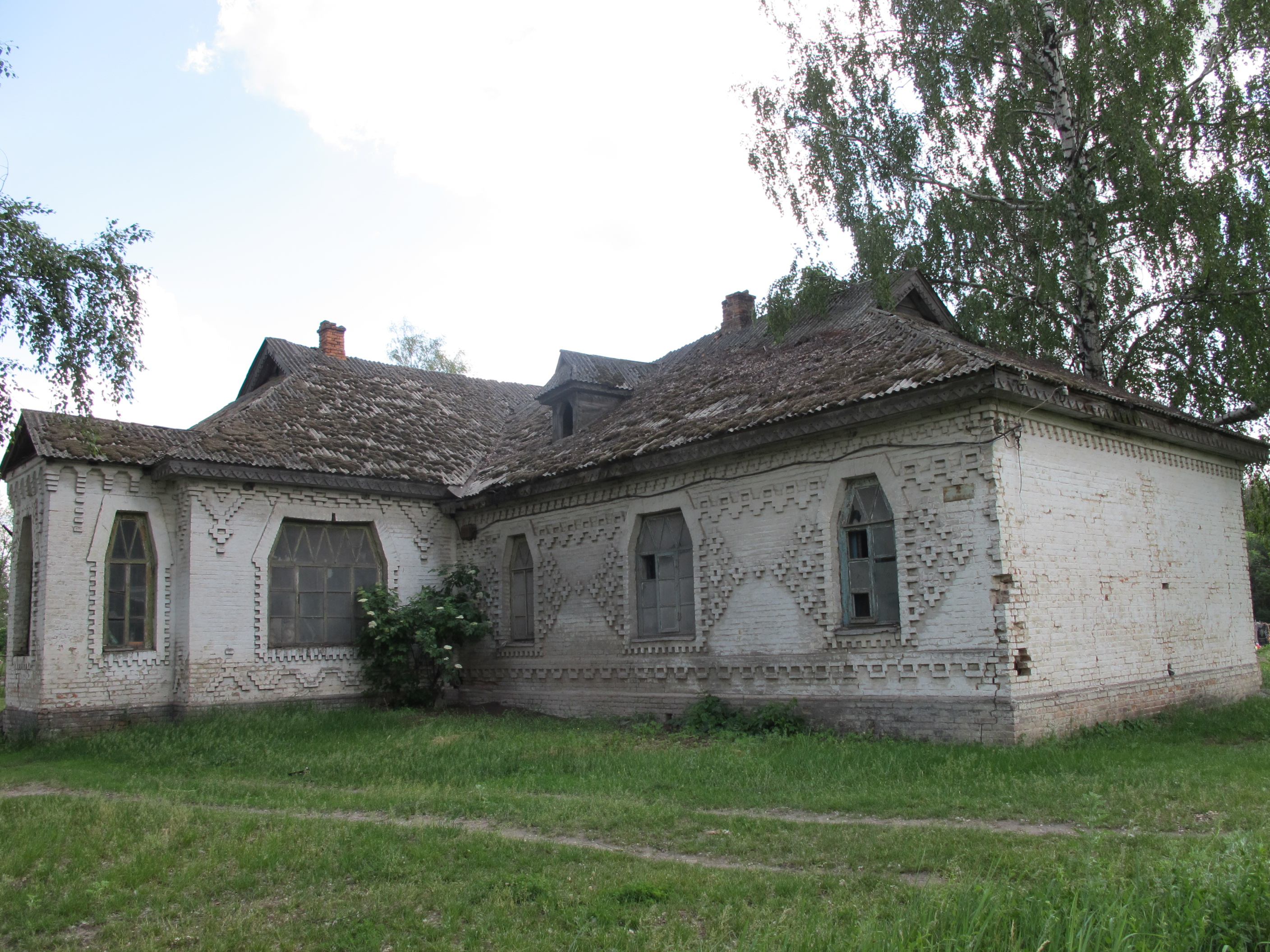 Дом рядом с кладбищем в селе Пески Лохвицкого района